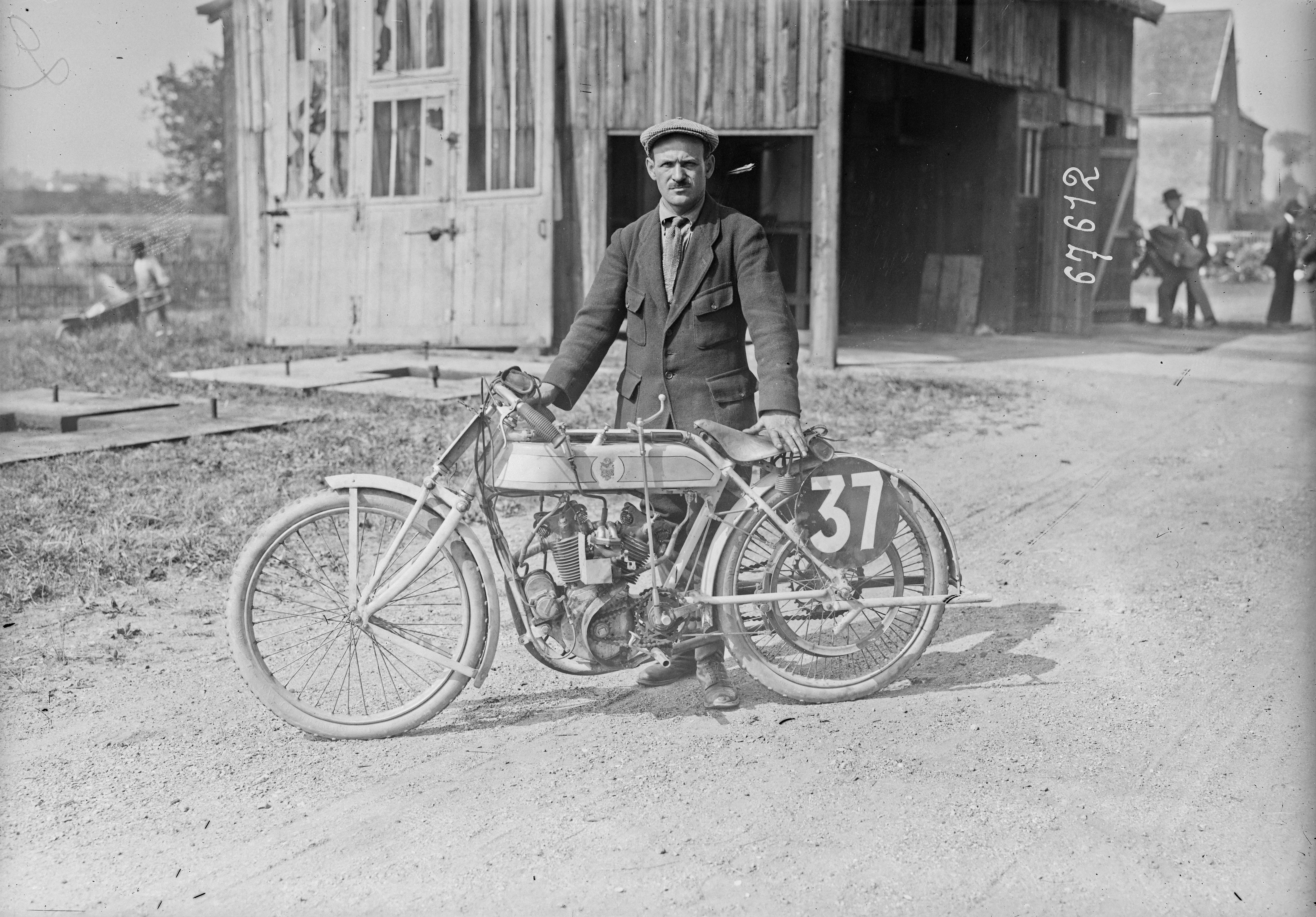 22-7-21, pesage du Grand prix de la Sarthe, Paul Meunier sur Alcyon [grand prix des motocyclettes, pesage aux usines Bollée du Mans].